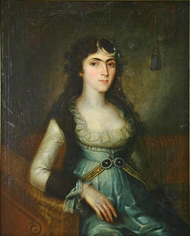 Mihail Töpler - Maria Dudescu / Logofeteasa Maria Dudescu, ulei pe pânză, Muzeul Naţional de Artă al României, Bucureşti